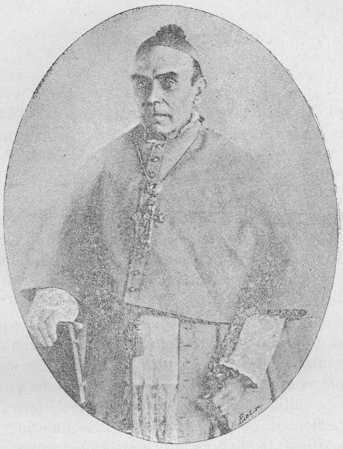 Pelayo González Conde.